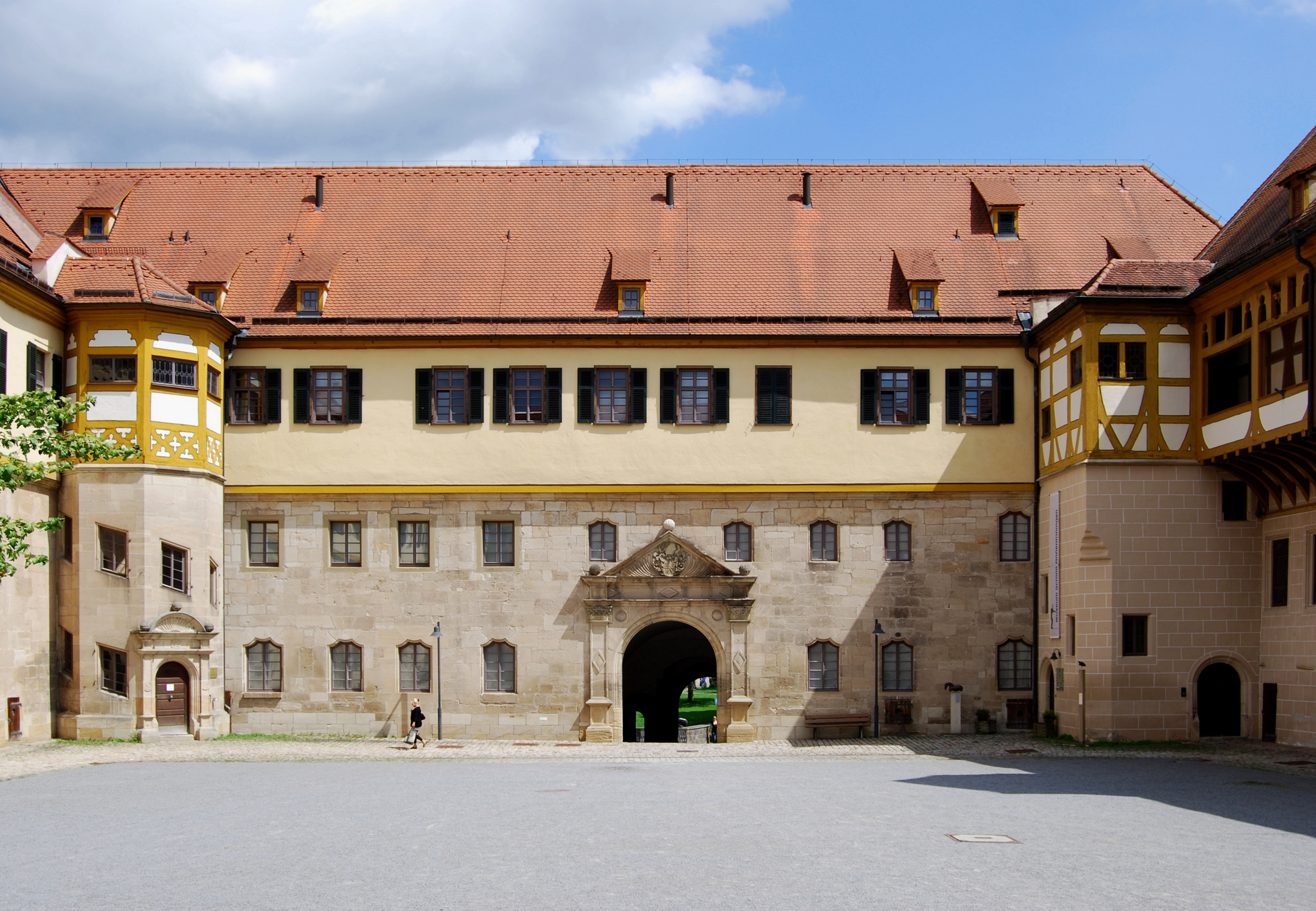 Schloss Hohentübingen, Innenhof